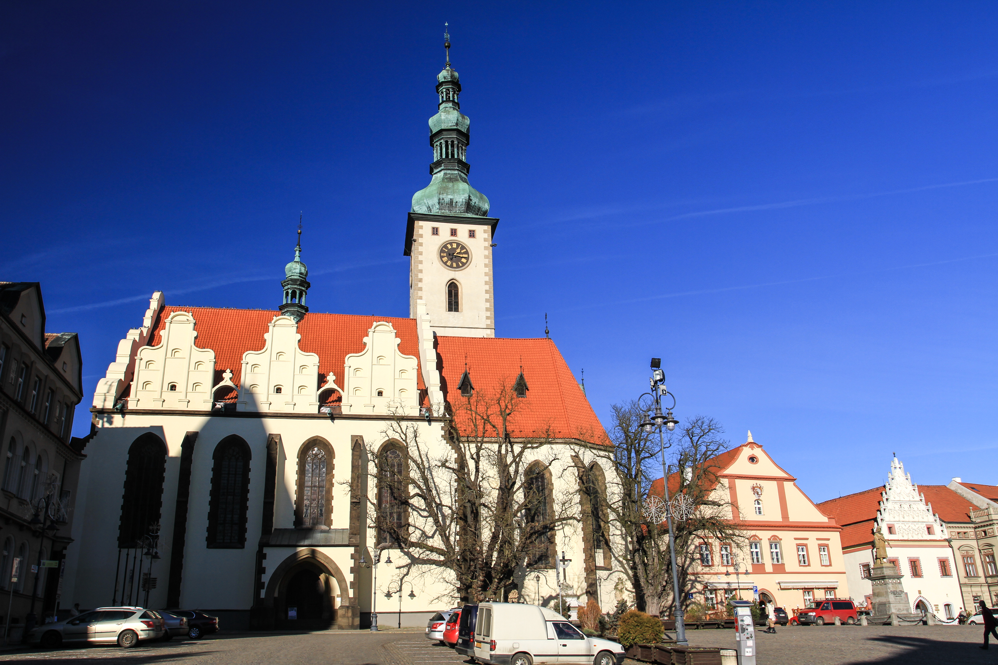 Kostel Proměnění Páně na hoře Tábor, nám. Žižkovo, Tábor, Tábor.